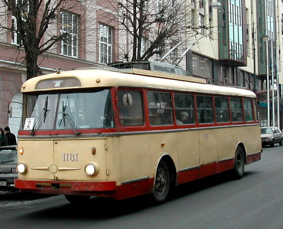 Skoda trolleybus in Vilnius